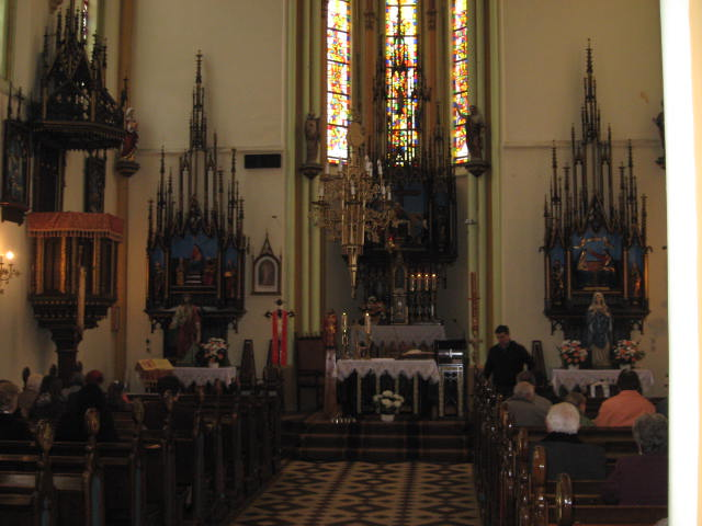 Kościół Matki Boskiej Bolesnej w Tułach